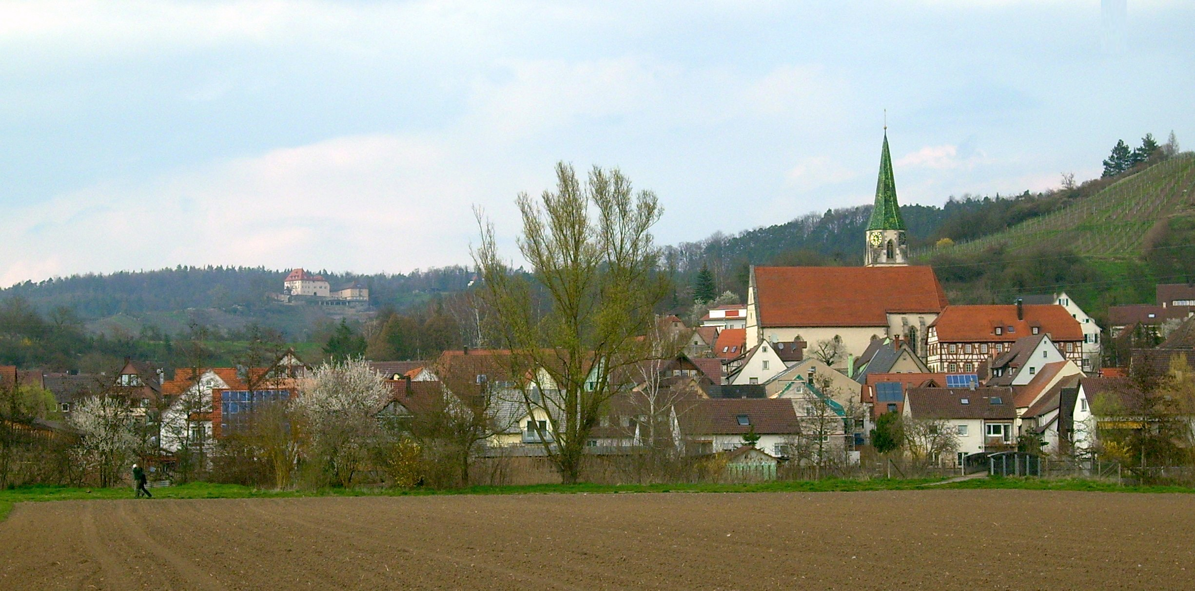 Unterjesingen, mit St.-Barbarakirche, ehemaligem Schulhaus und im Hintergrund Schloß Roseck